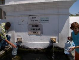 Chanfariz de Massamá, Queluz